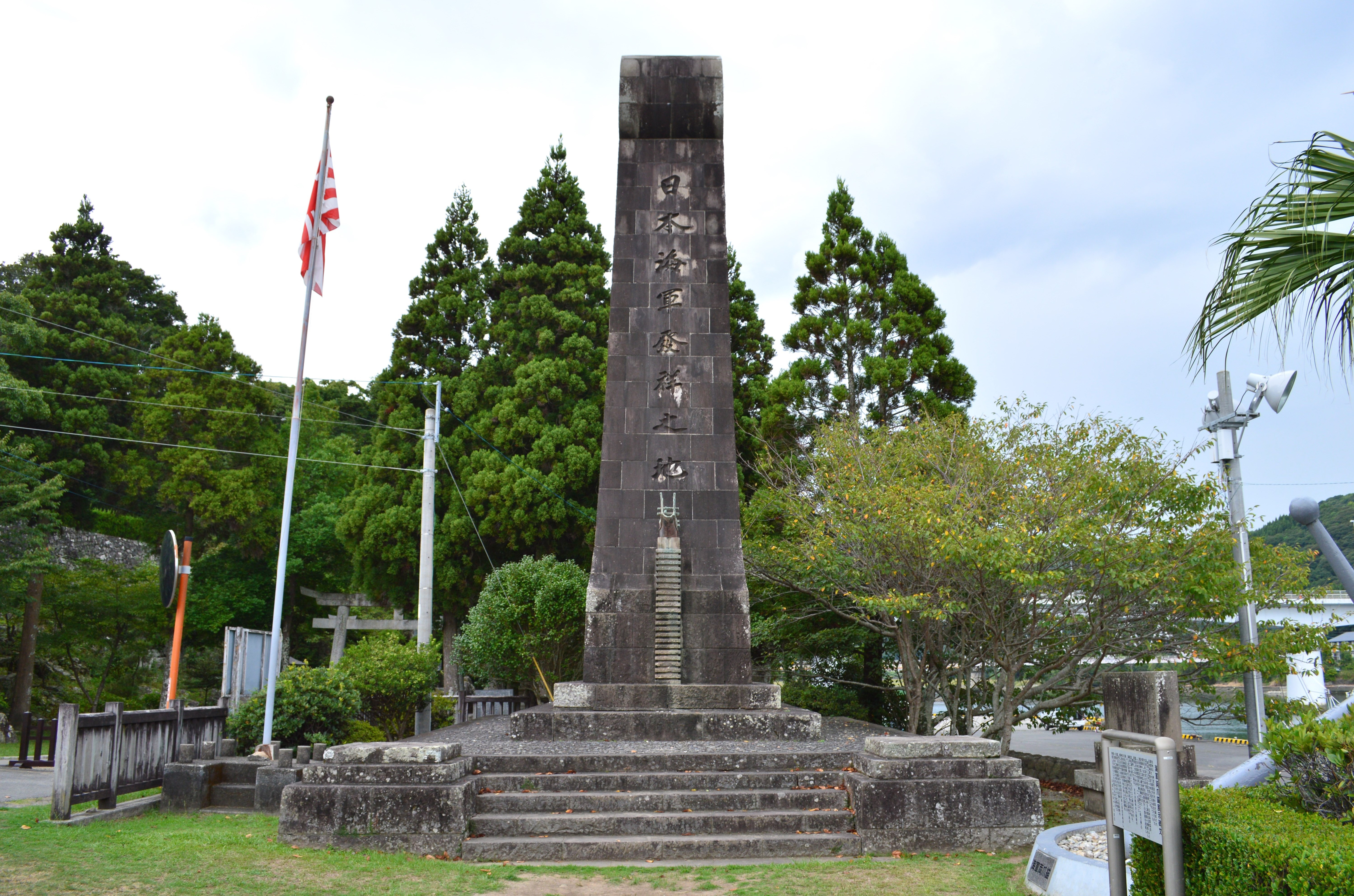 日本海軍発祥地碑